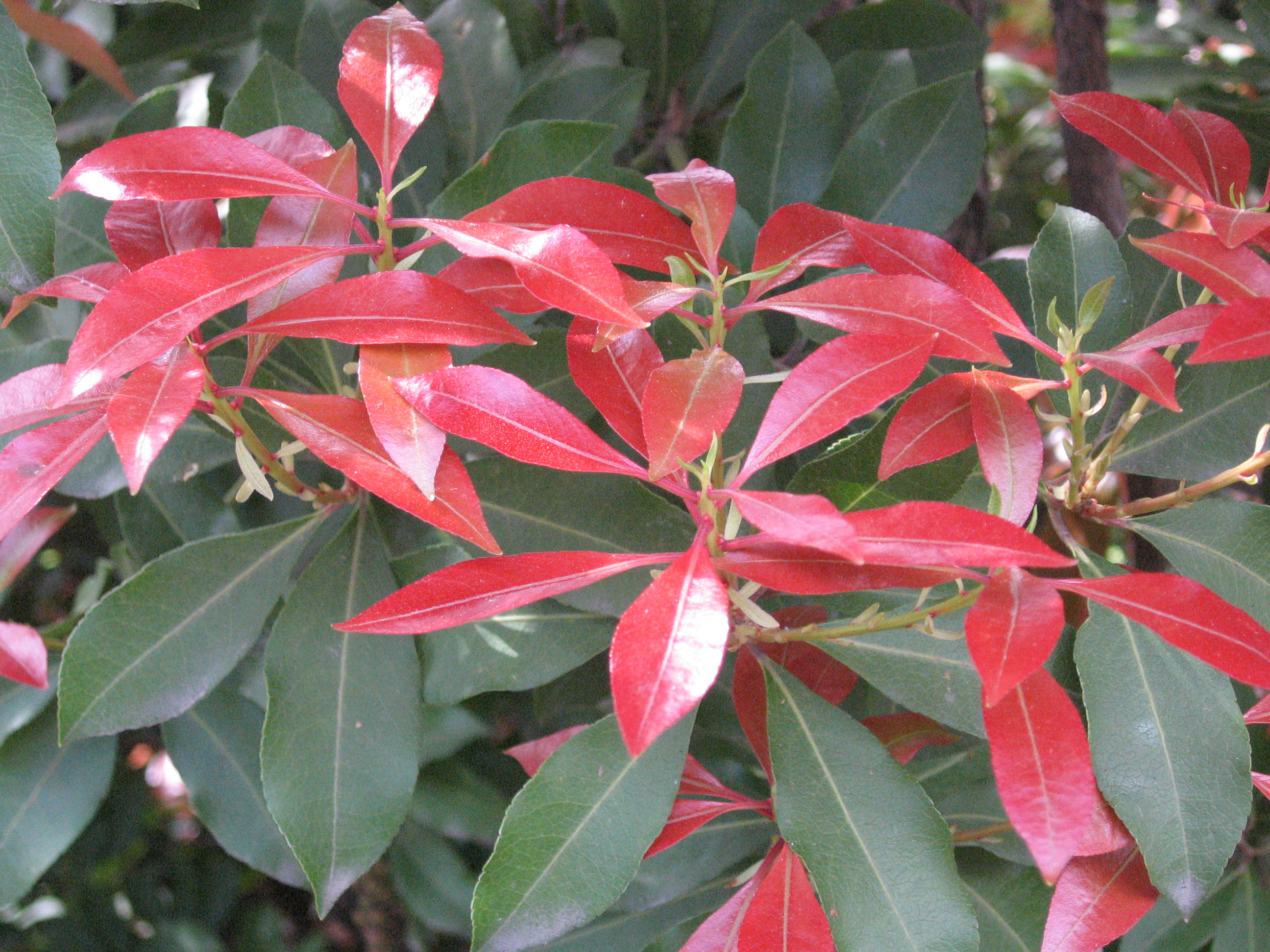 Pieris japonica ‘Mountain Fire’. Real Jardín Botánico, Madrid.